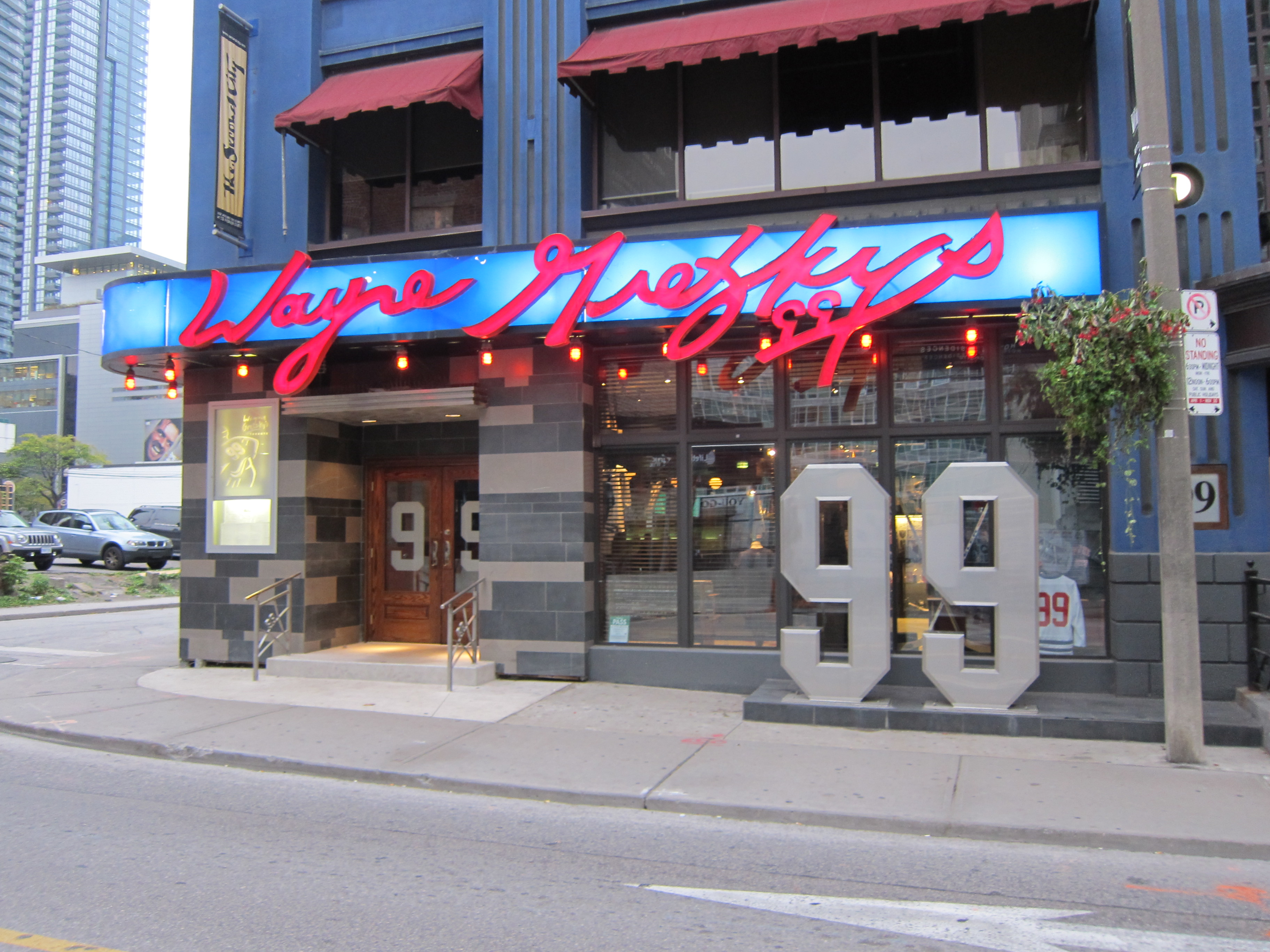 At Toronto, Ontario